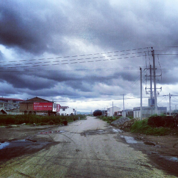 四川唐克镇一景